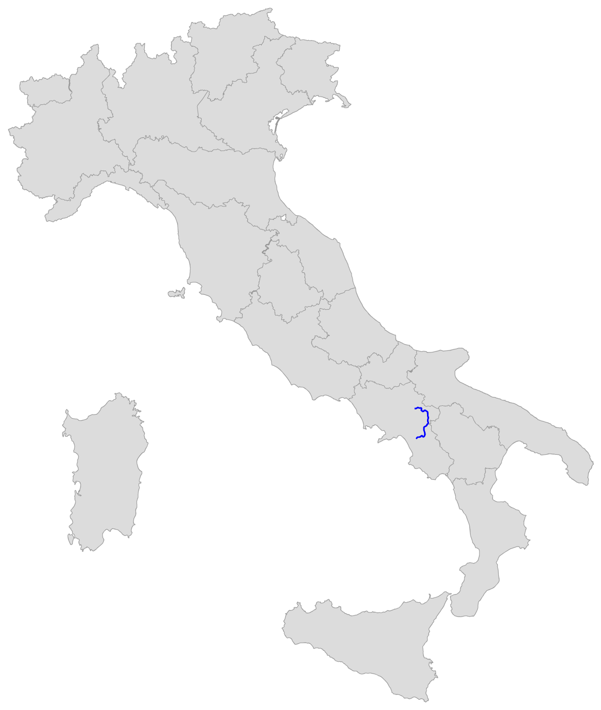 Percorso della SS 91 della Valle del Sele